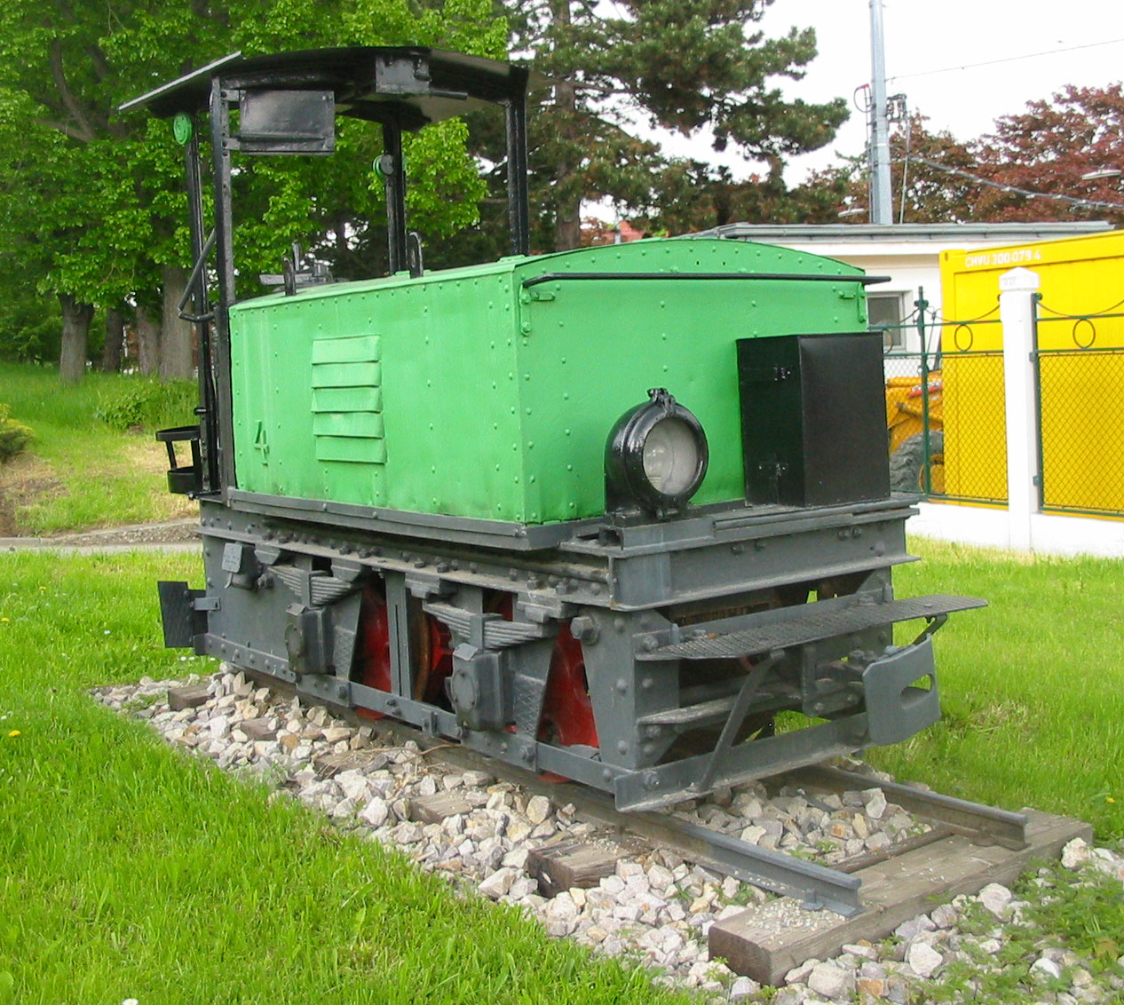 Narrow gauge railroad (Feldbahn) in Geriatriezentrum Lainz, Vienna, Austria